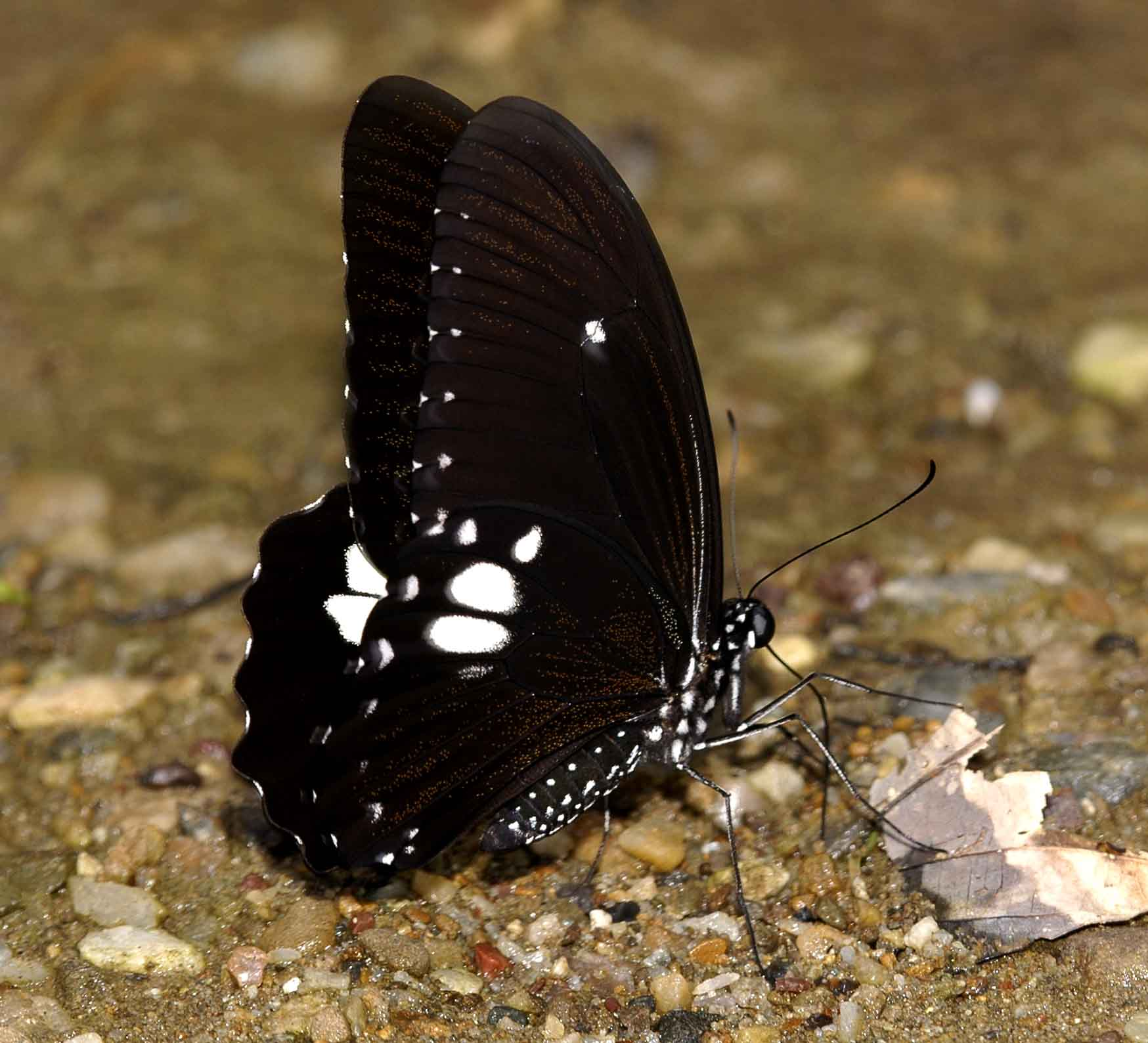 Common Raven Papilio castor Family Papilionidae, Lepidoptera